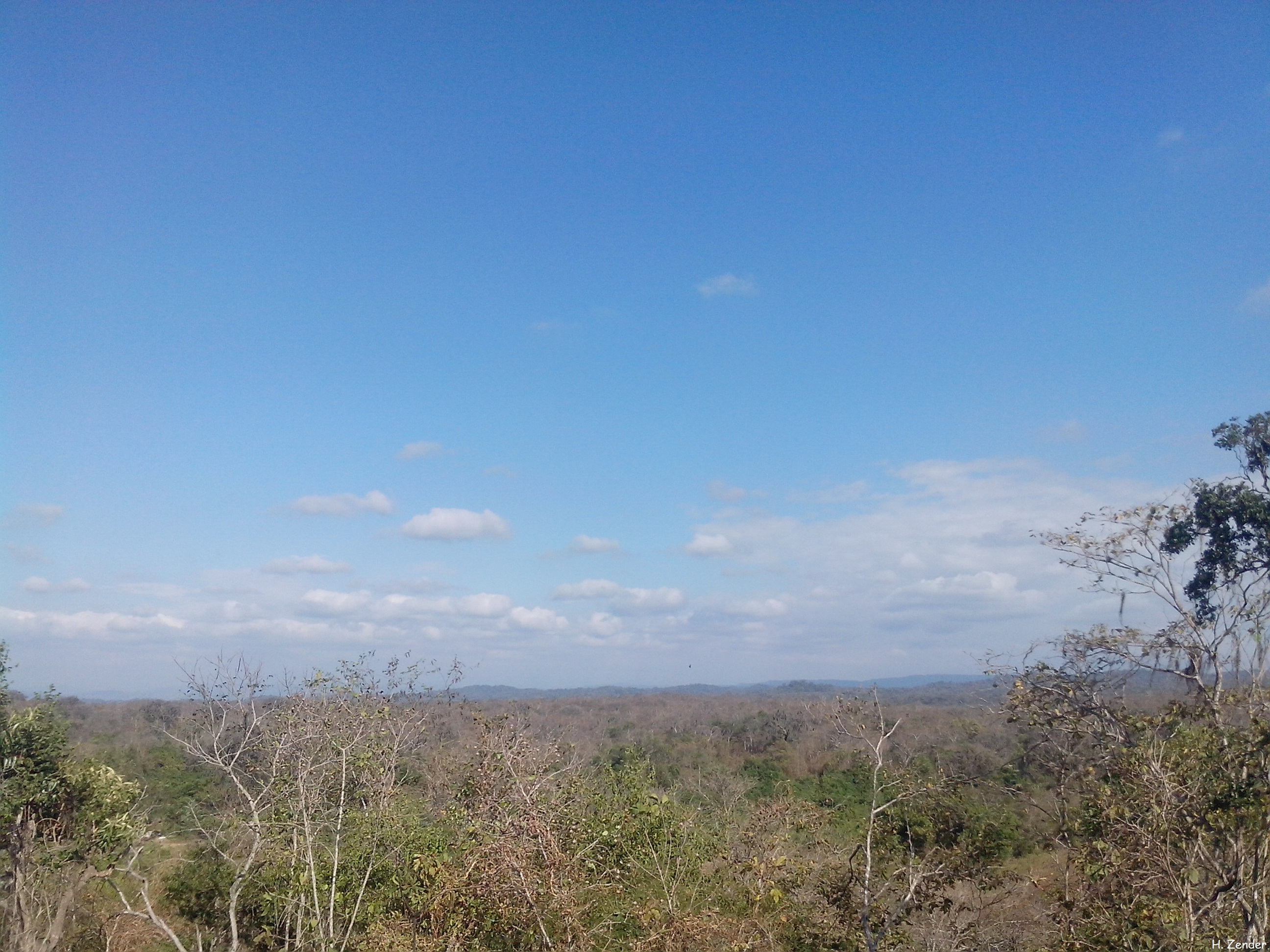 Temporada - Seca.